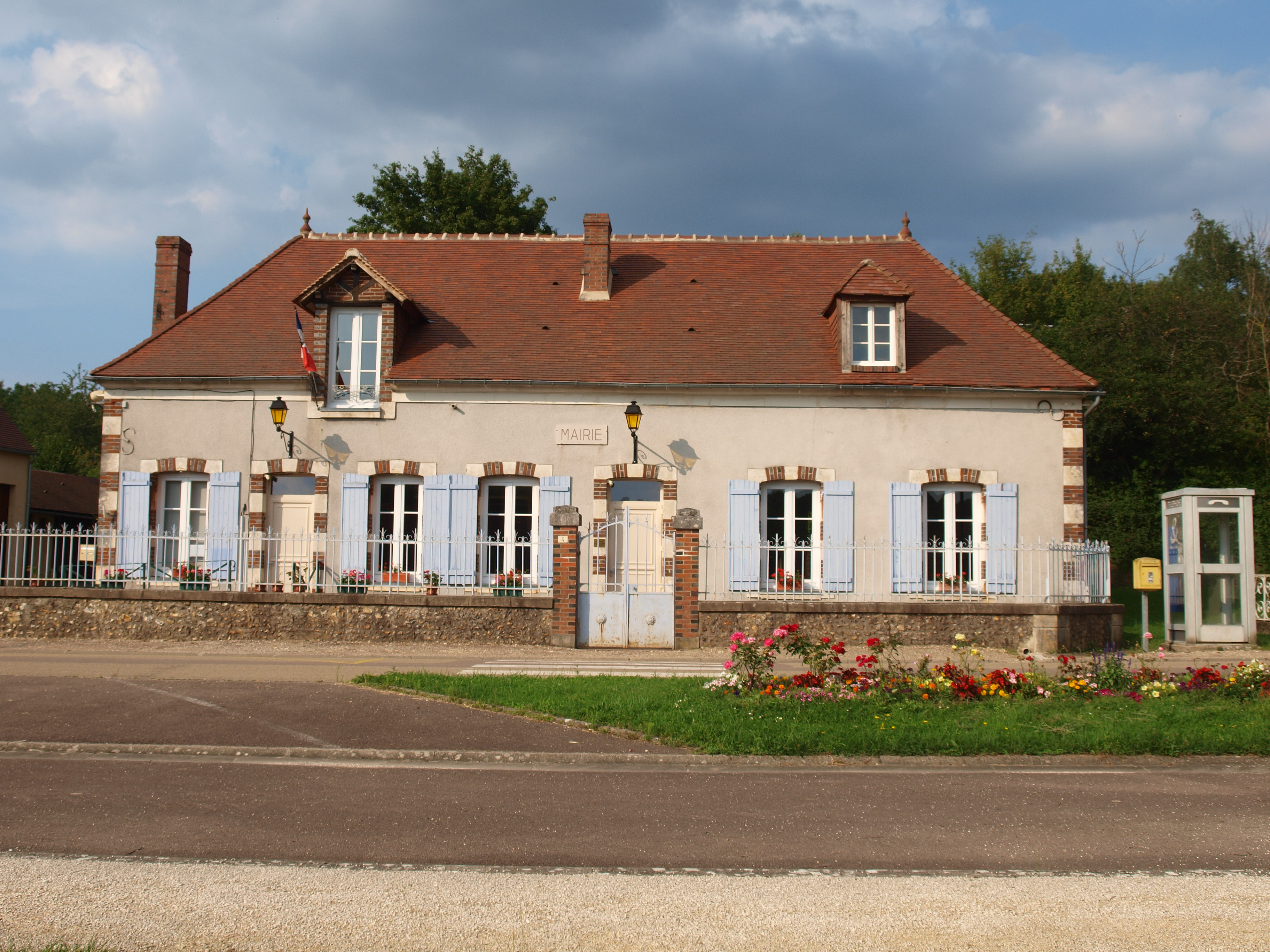 Ronchères (Yonne, France) ; la mairie.